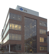 Neubau des IPA